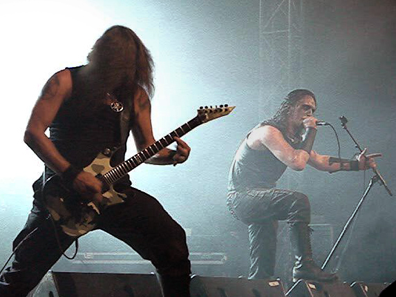 Marduk au Hellfest, à Clisson, le 18 Juin 2010.